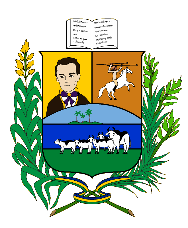 Escudo del Municipio Aragua, Estado Anzoátegui.